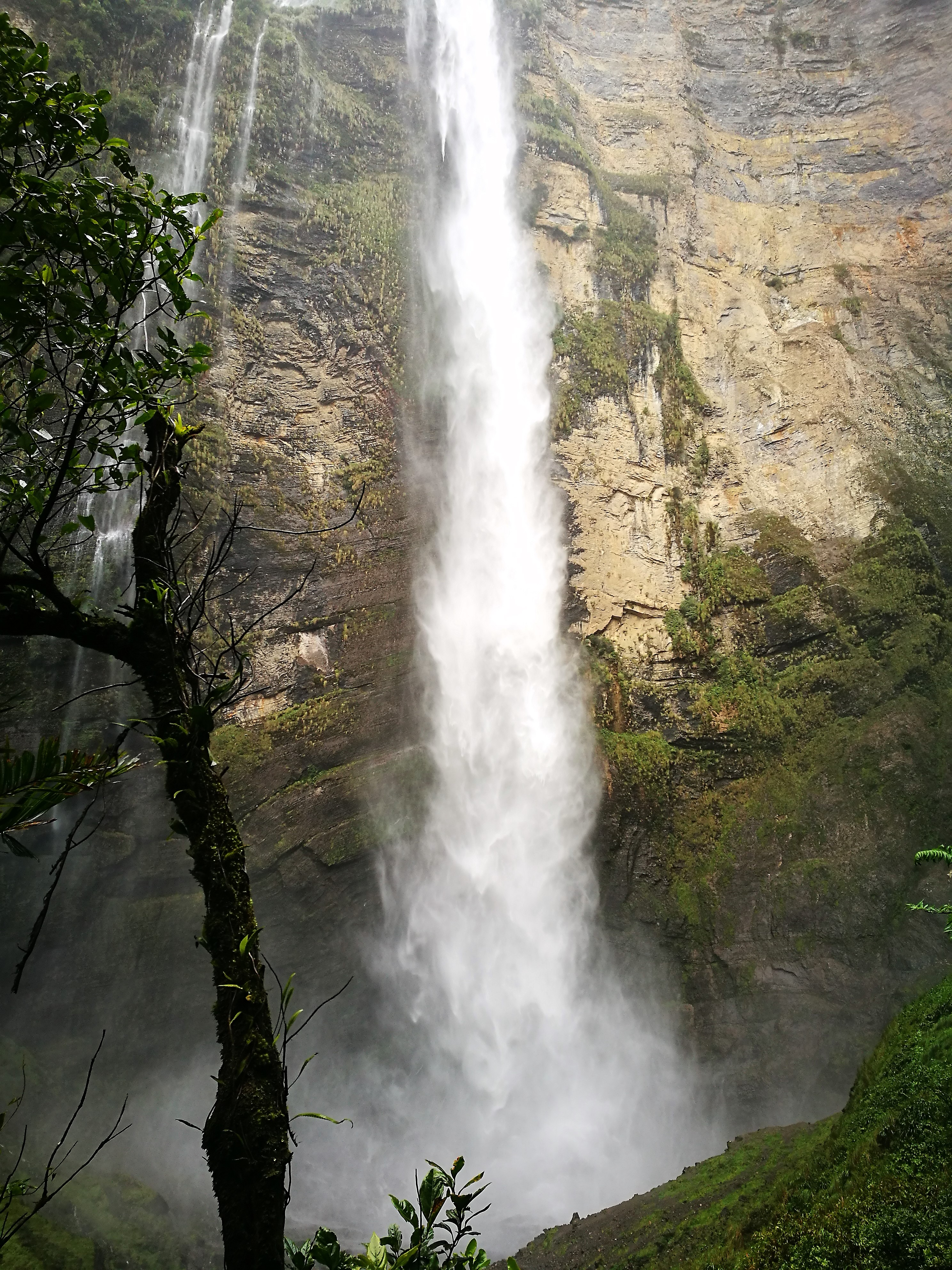 Segona caiguda del Gocta